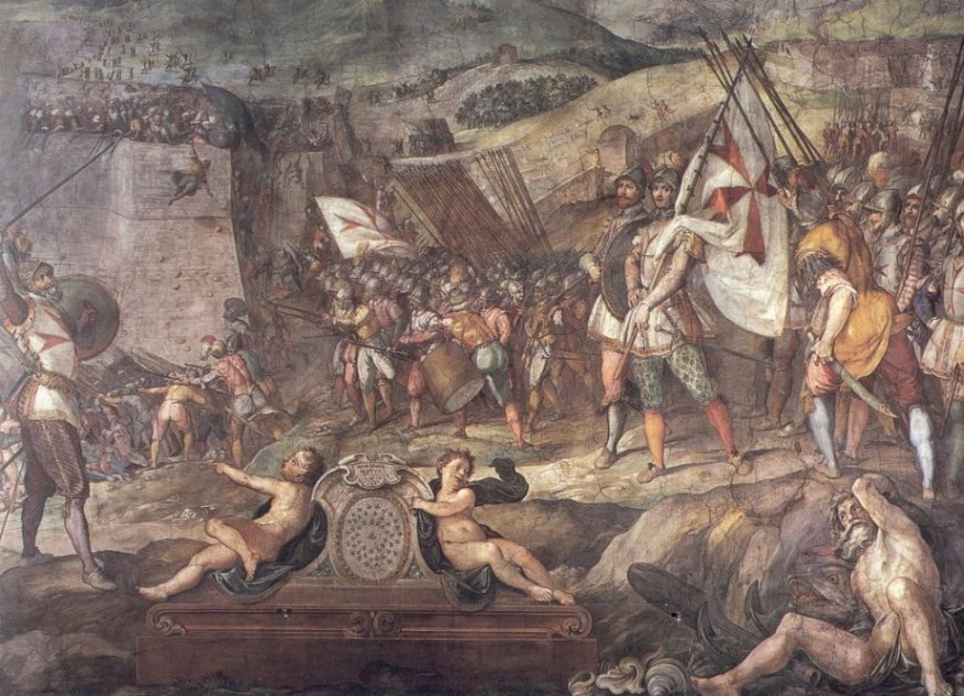 Bernardino Poccetti, La conquista di Bona, Firenze, Palazzo Pitti, Sala di Bona